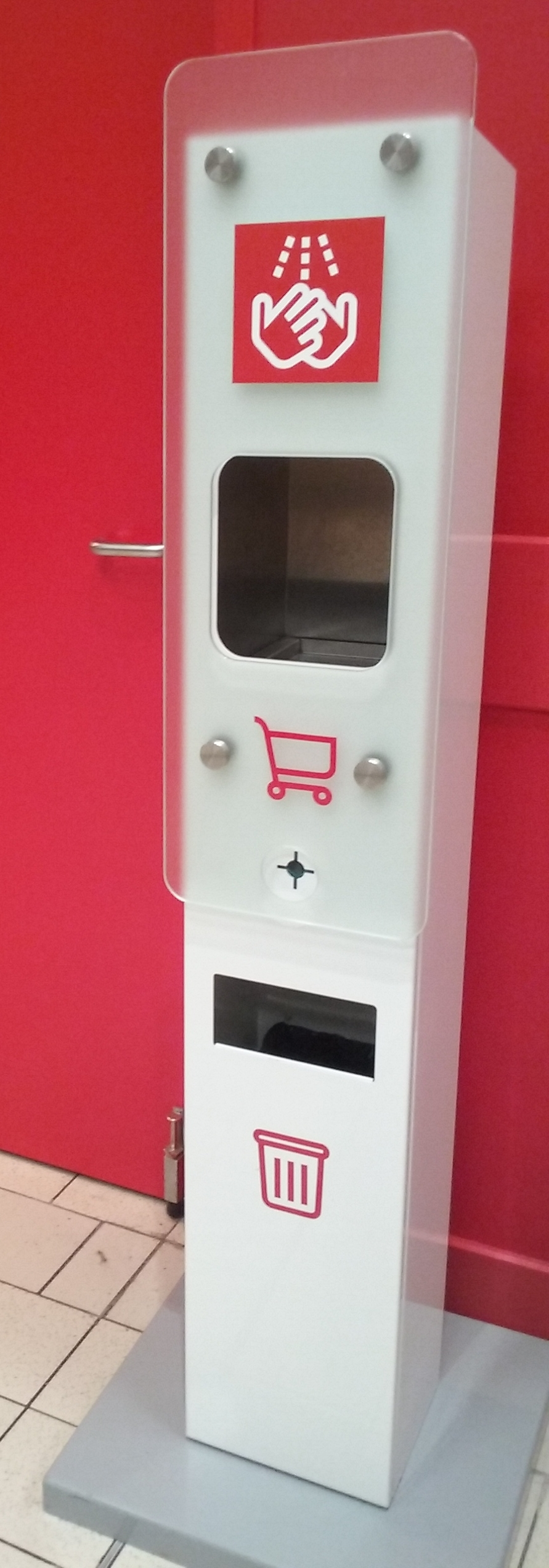 Automat do dezynfekcji rąk w 60-tysięcznym Tomaszowie Mazowieckim, w województwie łódzkim